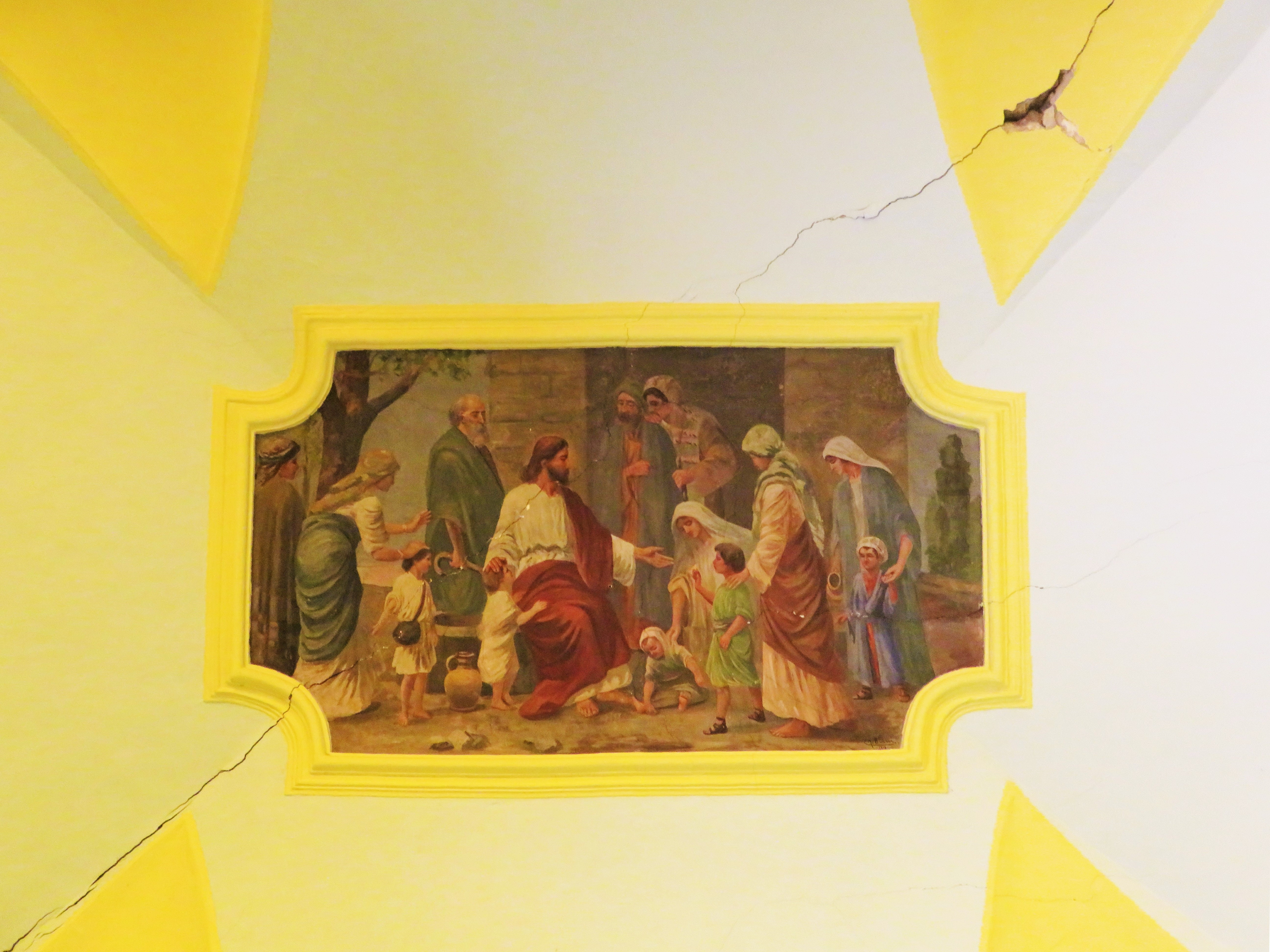 Affresco sul soffitto della sacrestia. Visibili i segni che potrebbero essere indice di una situazione di pericolo.